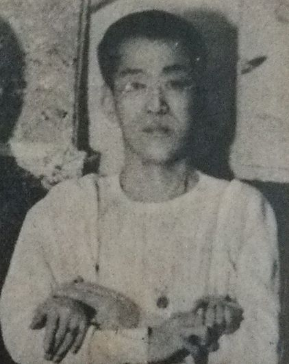 平凡寺